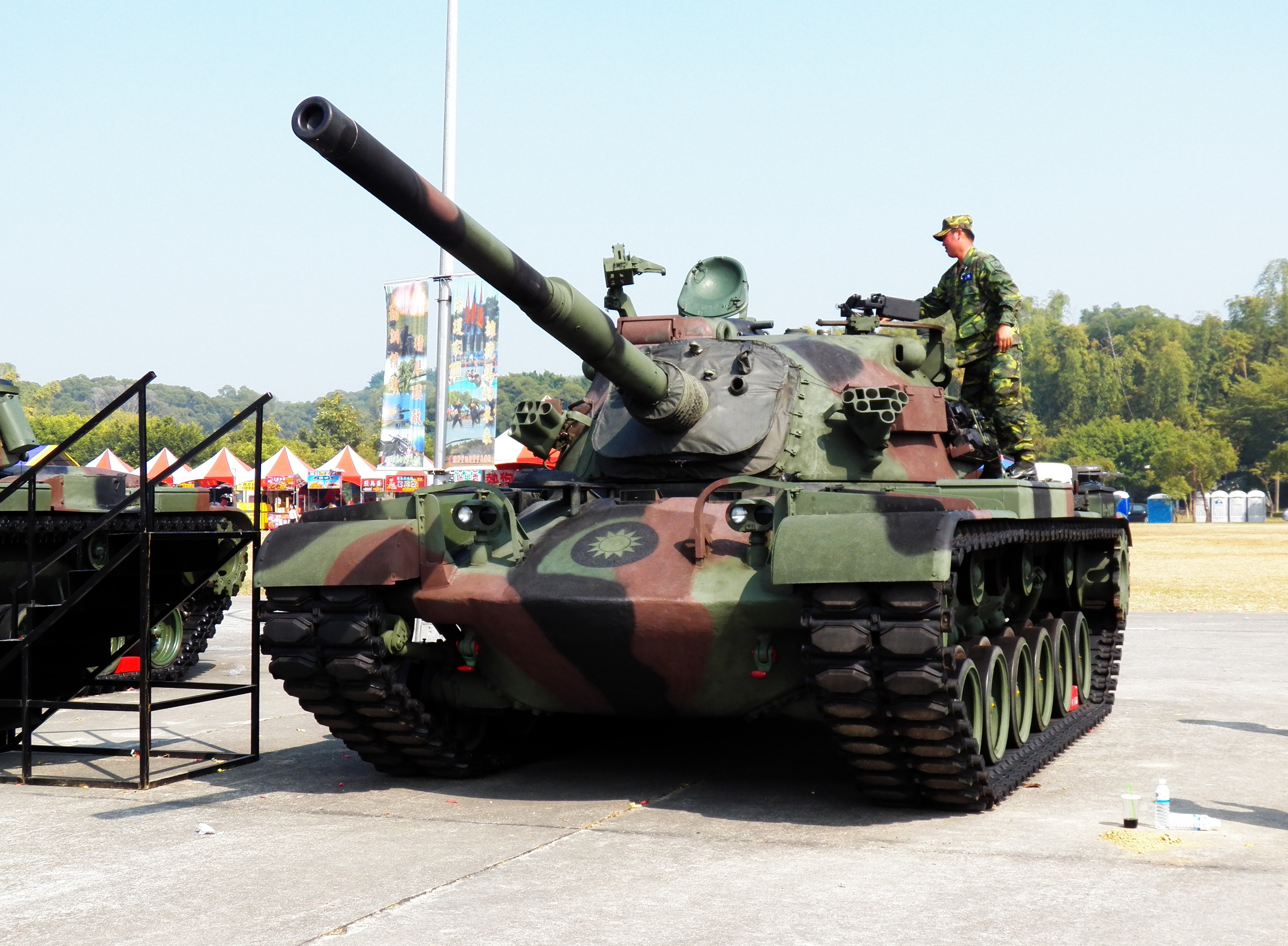 陸軍步兵學校80週年校慶營區開放活動，展示之CM-12戰車。